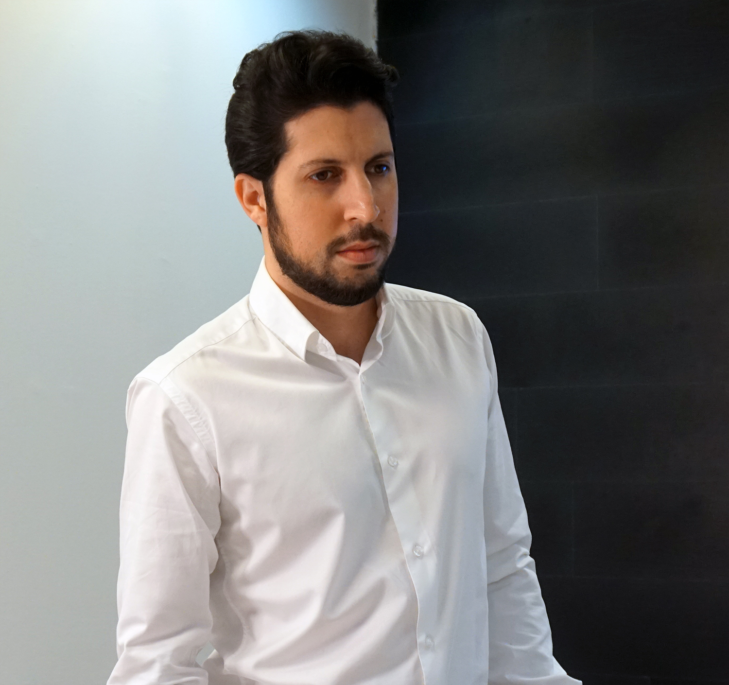 תמונה של גיל רבי, מנכ"ל רבי אינטראקטיב